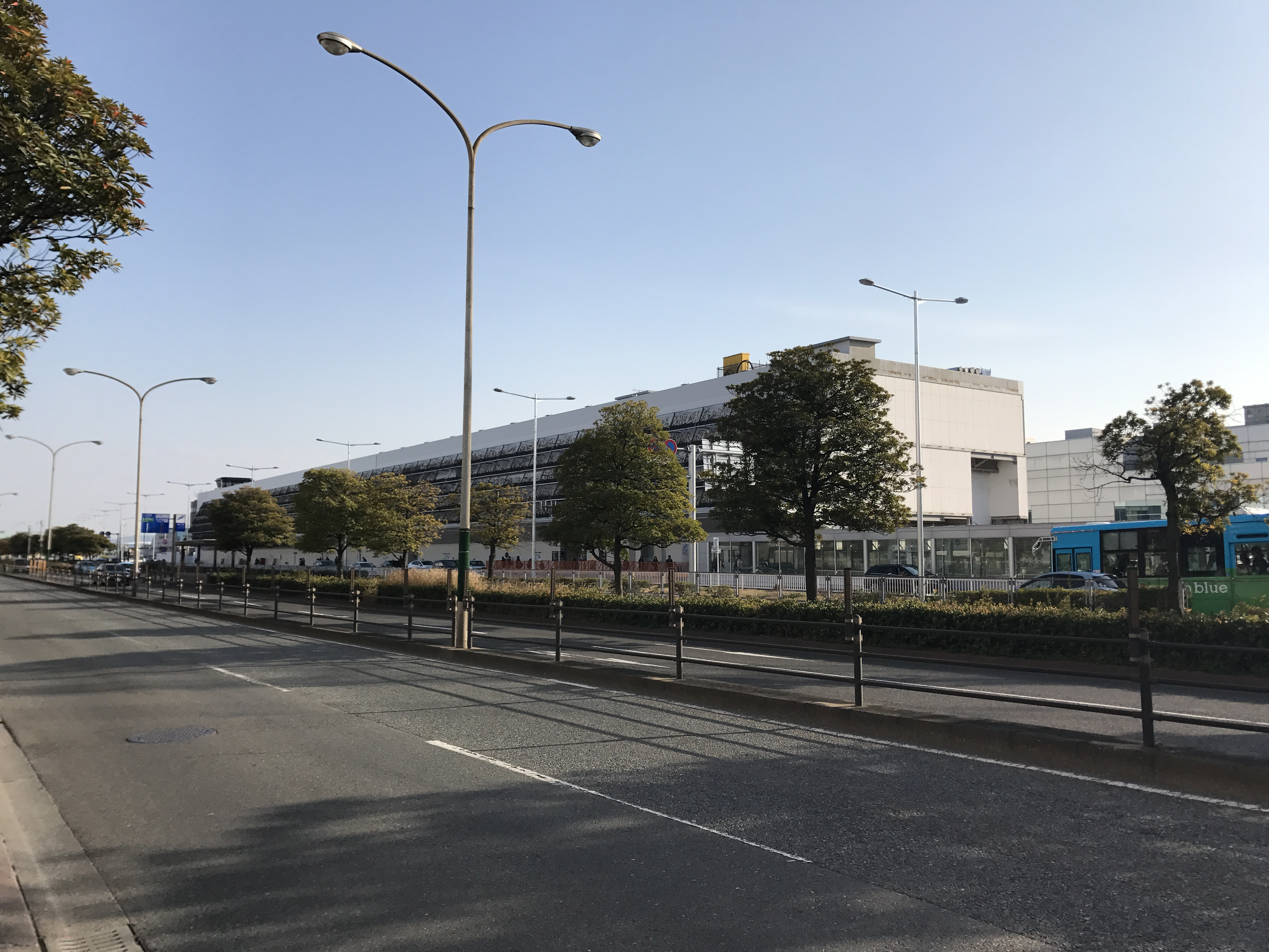 福岡空港・国内線第1ターミナルビル